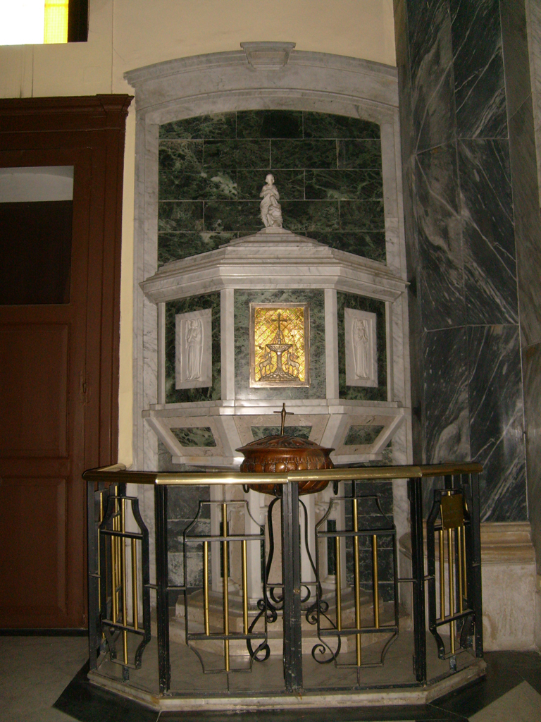 Battistero della Chiesa del Carmine di Cerignola (FG).